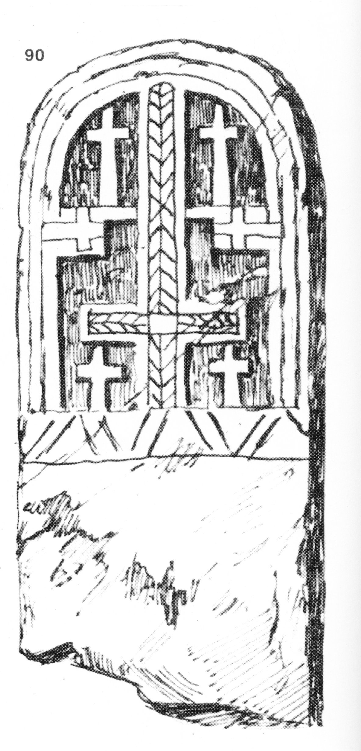 90. Плоча от бял пясъчник с гравирани и релефни кръстове из двора на църквата „Св. Параскева" в гр. Бяла Слатина. Горният край на плочата е заоблен. Груба изработка, неправилно нарисувано. Размери: 110х46х15 см. 1850 до 1877 г. Скицирана на 7 .VIII. 1930 г. (Т. 13, обр. 55.)